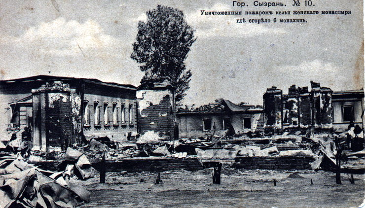 Сгоревшие кельи женского монастыря, где погибло 6 монахинь